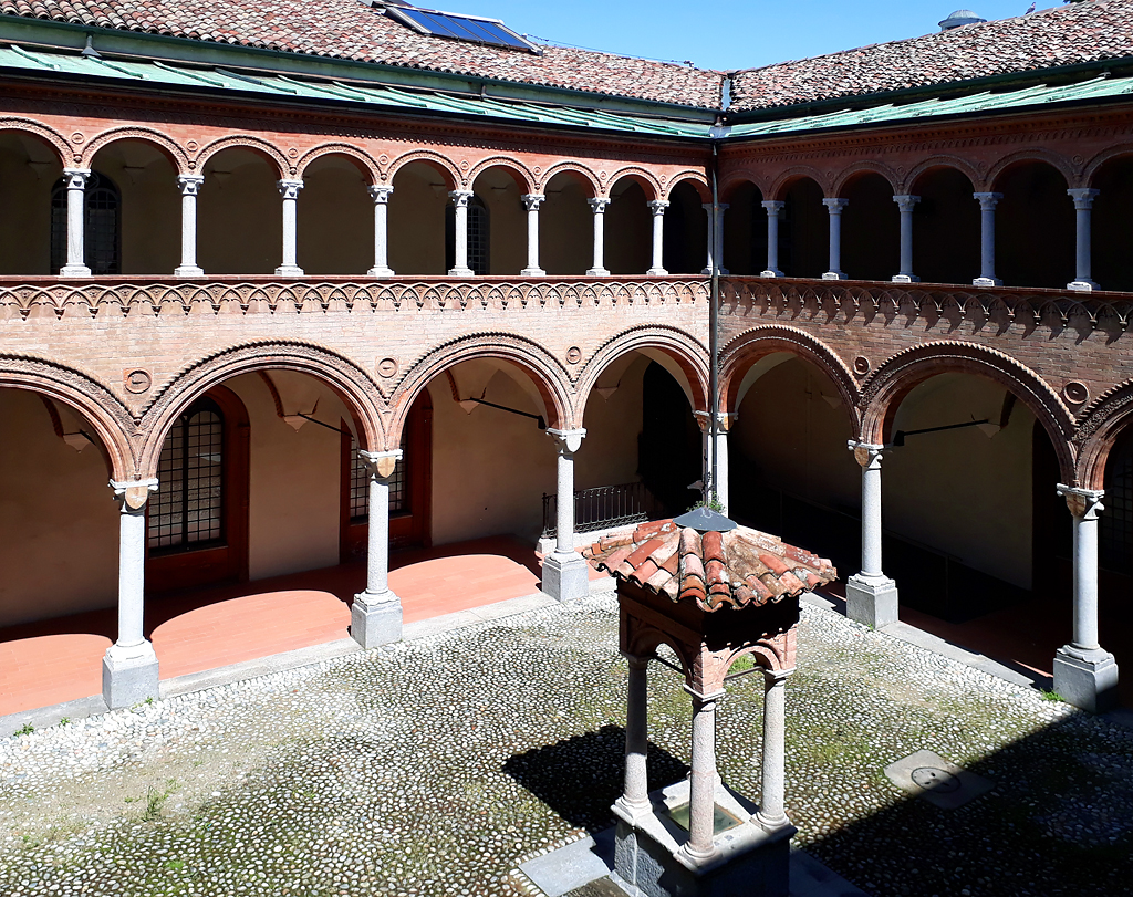 Lodi, il chiostro della Farmacia all'ospedale vecchio.